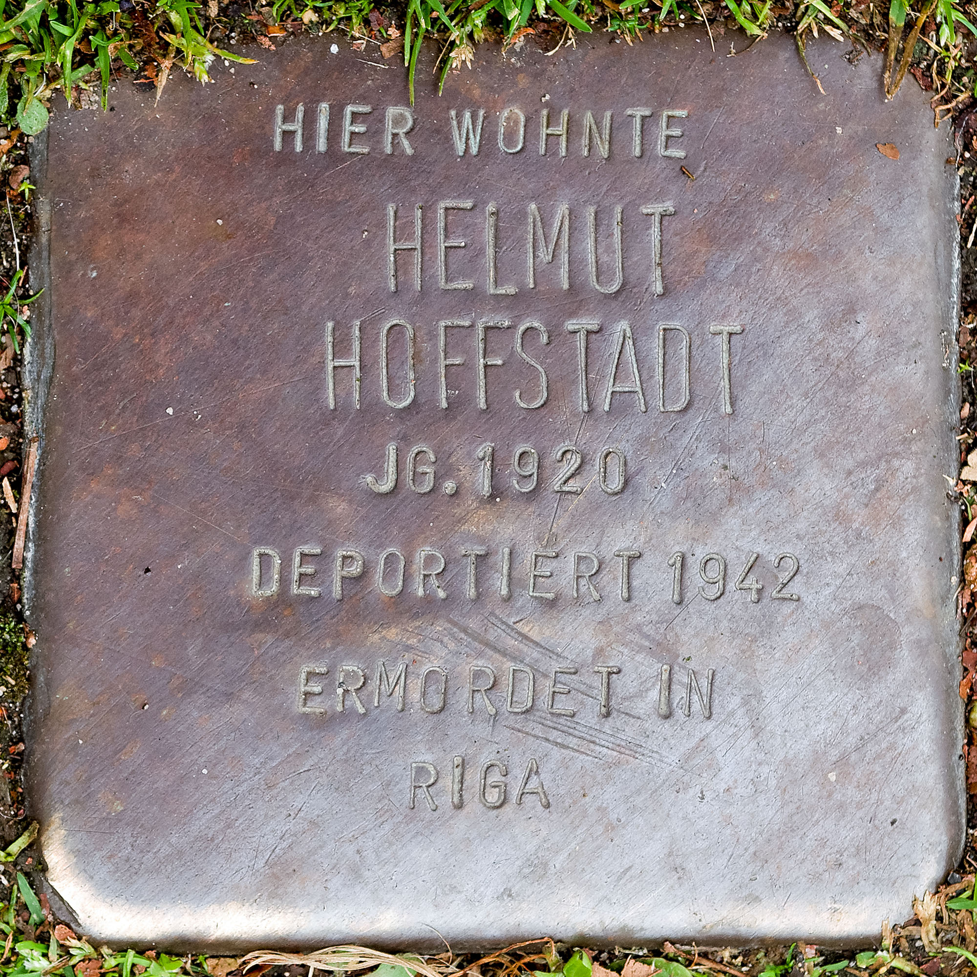 Stolpersteine in Viersen: Hoffstadt, Helmut